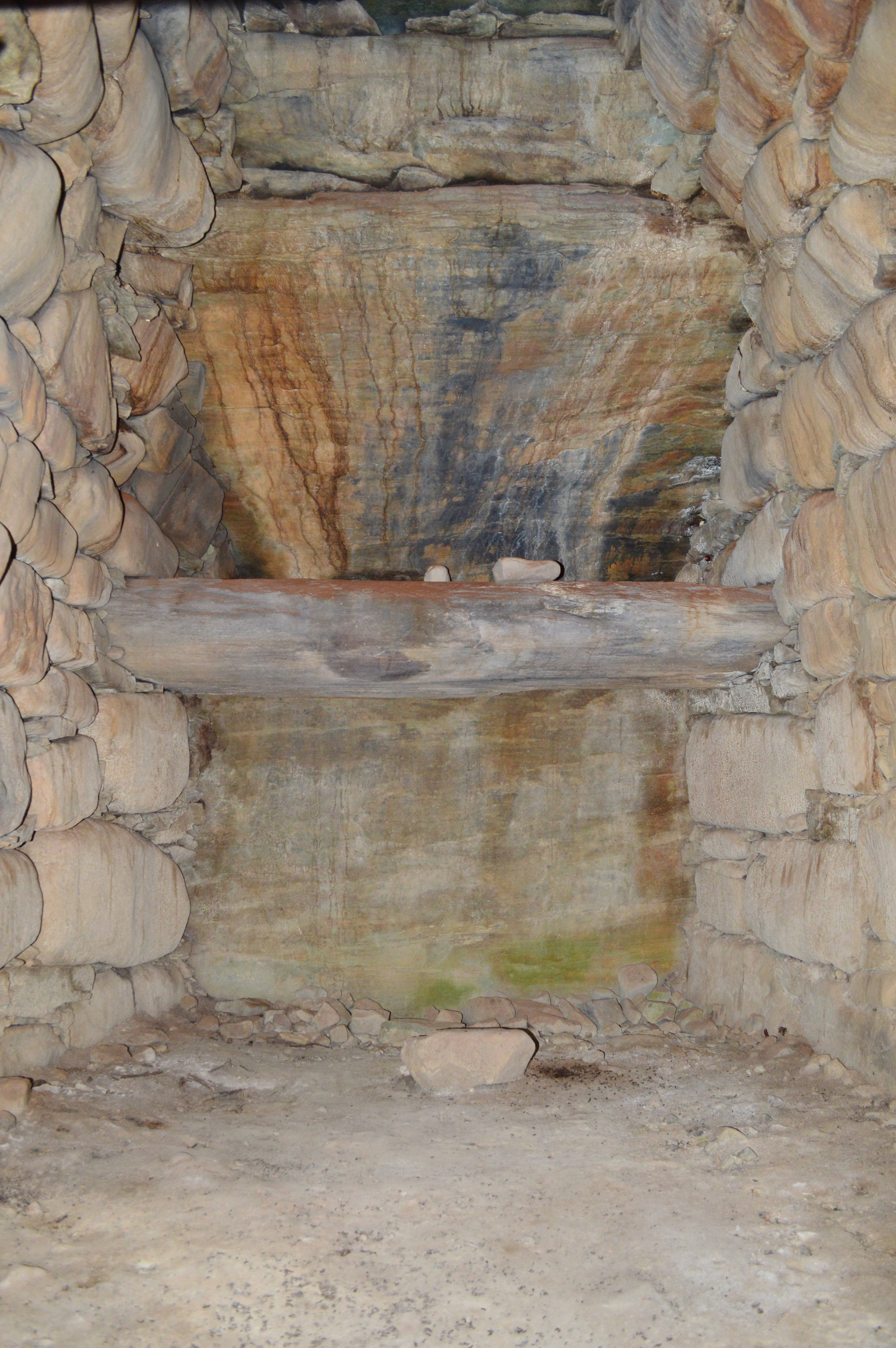 野村八幡古墳 石室玄室 Nikon D3200